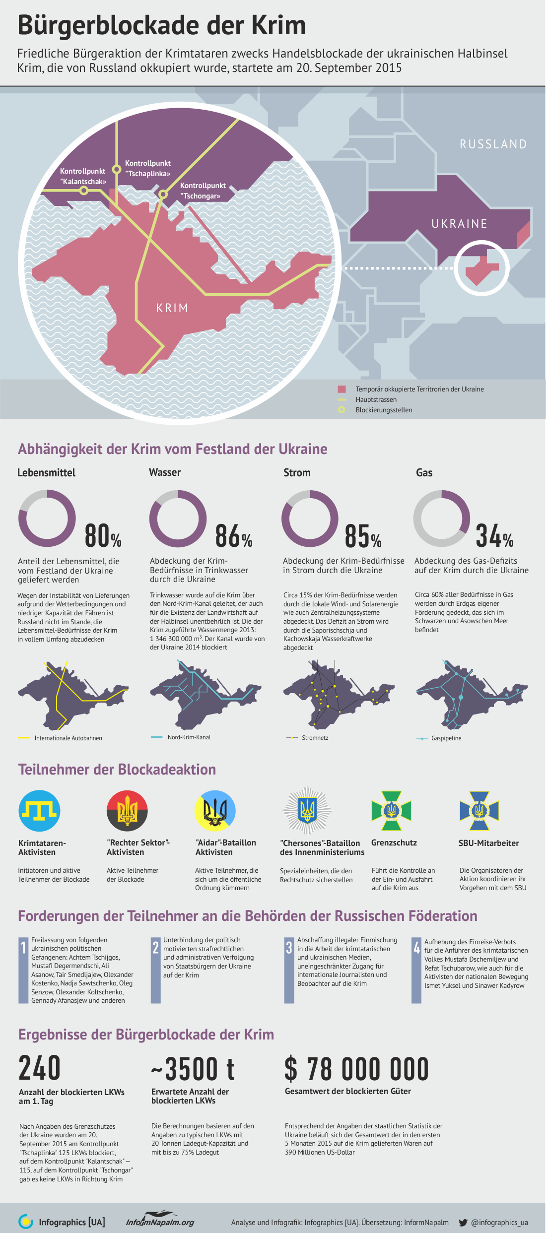 Bürgerblockade der Krim